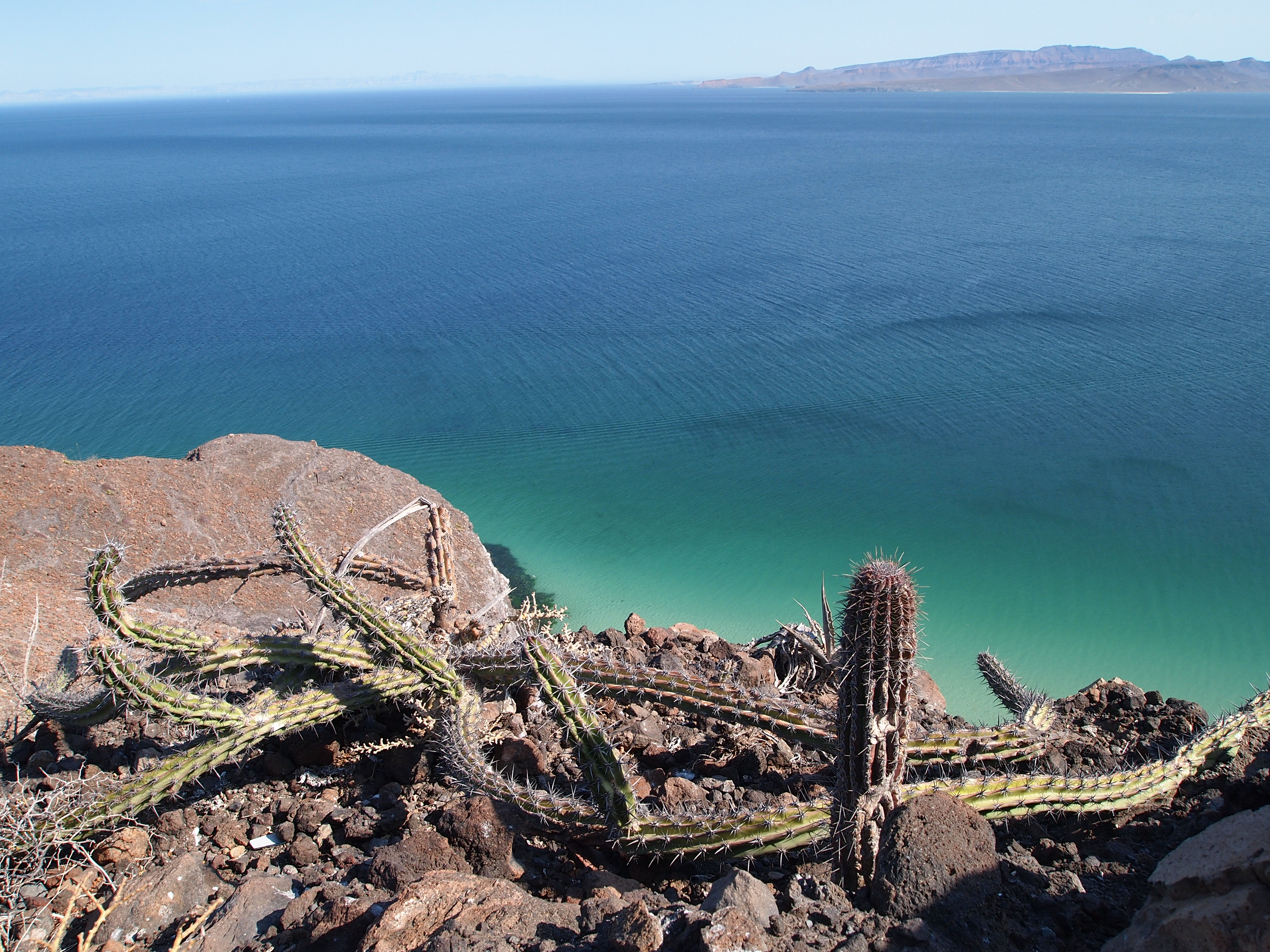 Playa El Tecolote (Atras Isla Espitiru Santo)